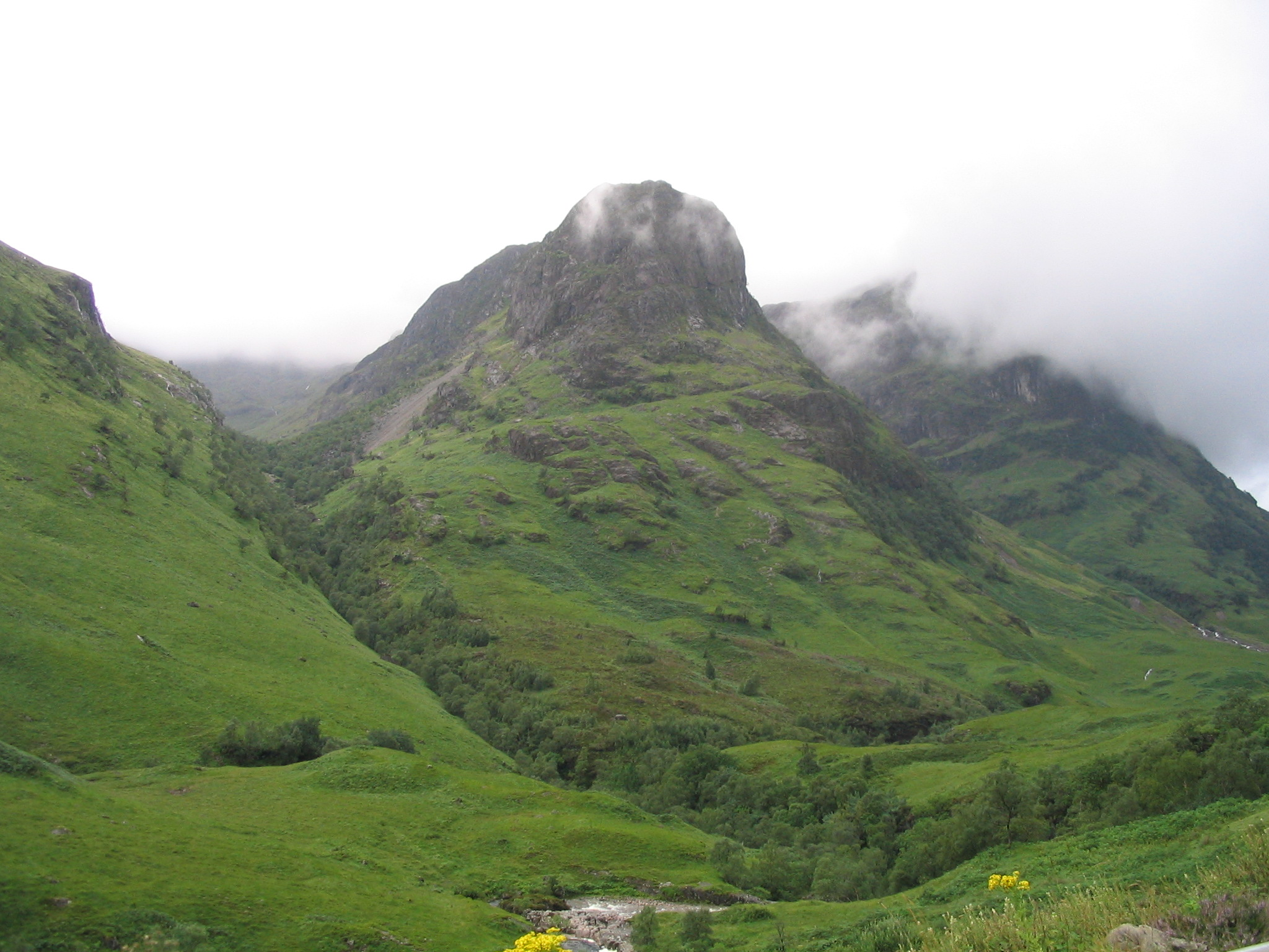 Glen Coe